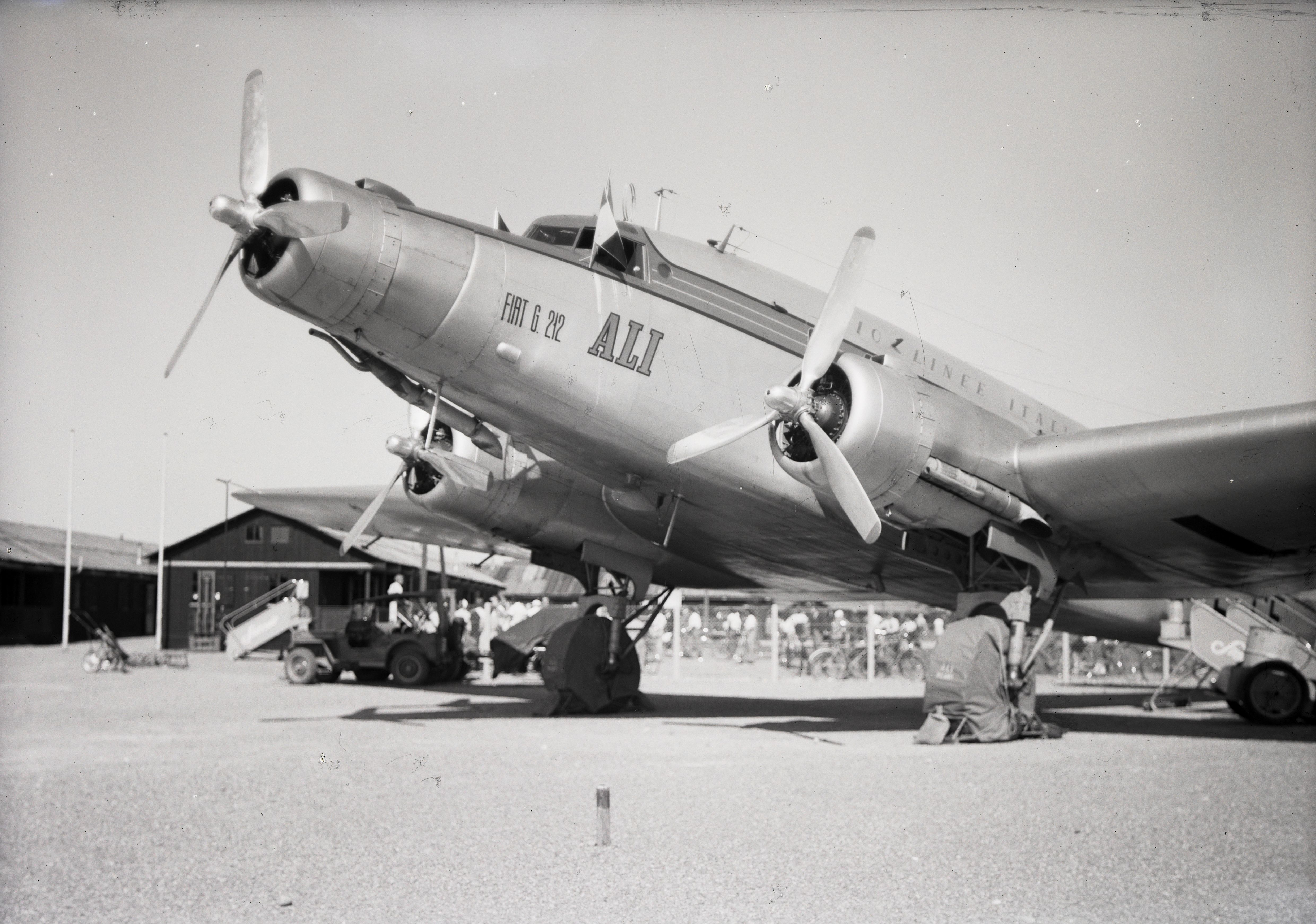 Baujahr 1947, am 4.5.1949 zerstört durch crash in Torino